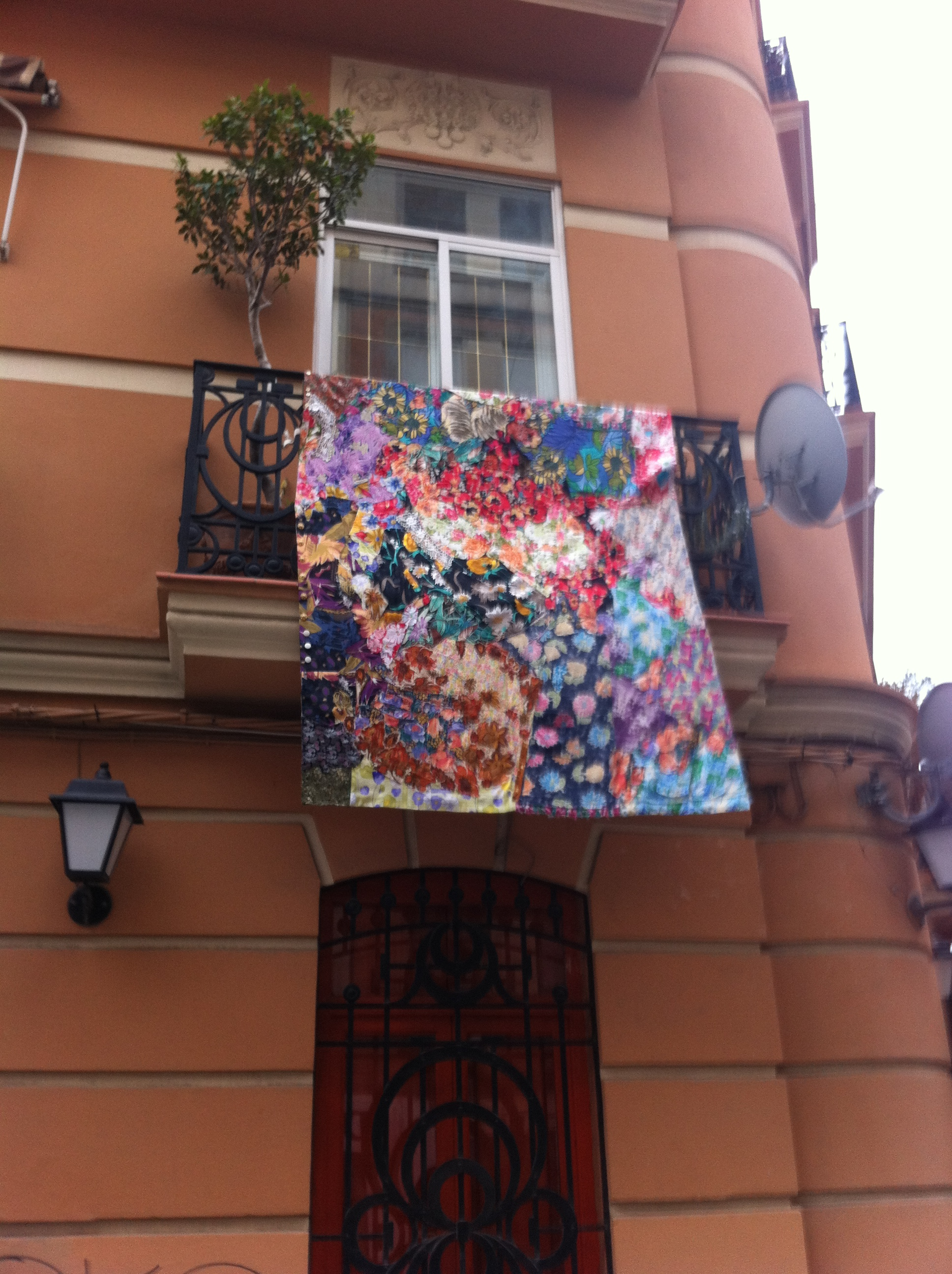 Balcones de Ruzafa en Carnavales (Valencia)